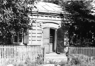 Купеческие склады по ул. Фрунзе, Ахтубинск